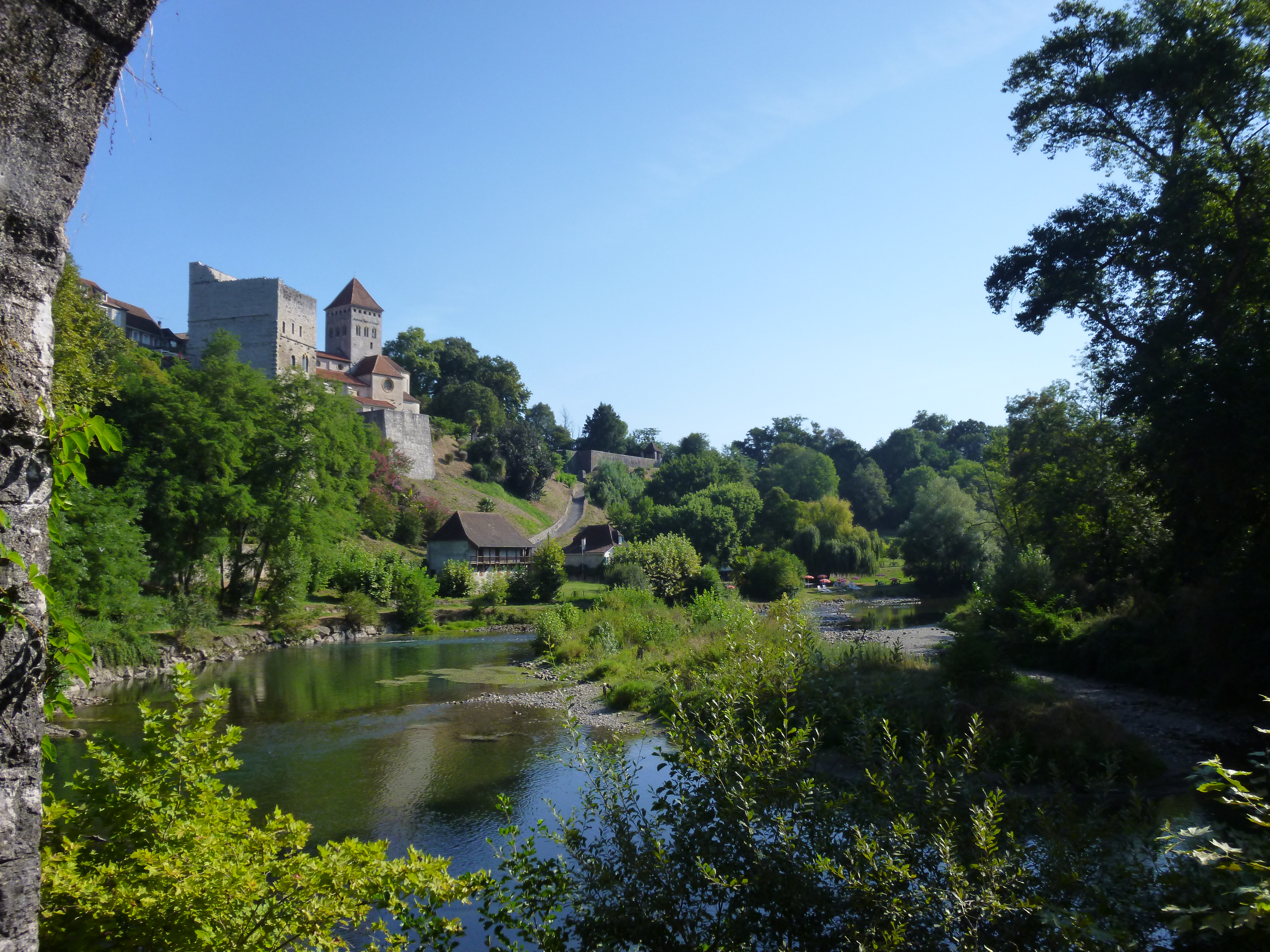 Vue sur le gave d'Oloron surplombé par la Tour Monréal et l'église Saint-André.